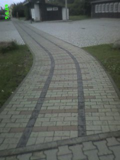 Fußweg am HP Pretzschendorf ehemaliger Gleisverlauf als Fußweg gestaltet